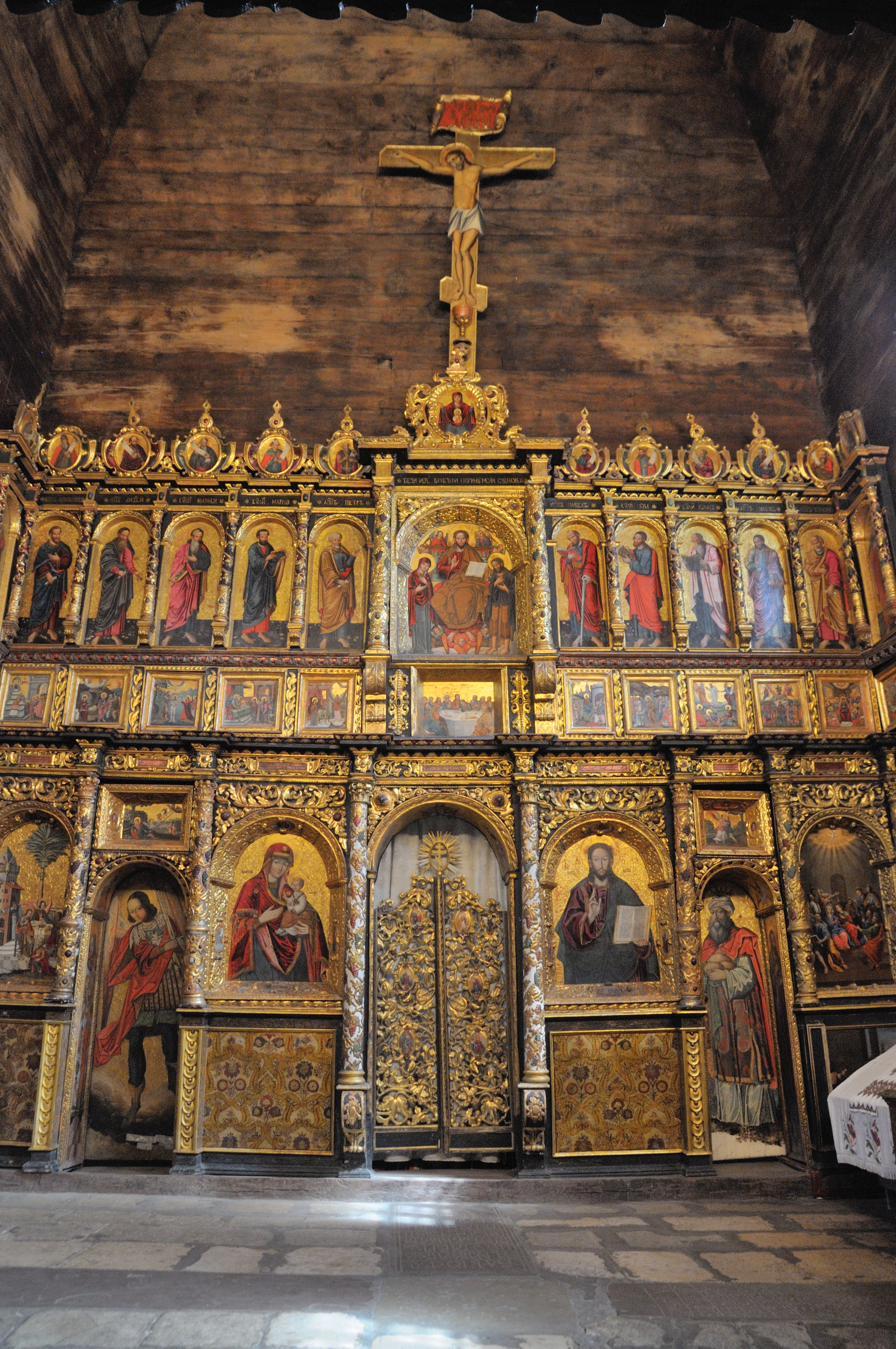 Святодухівська церква (дер.), Рогатин, вул. Роксолани, 10